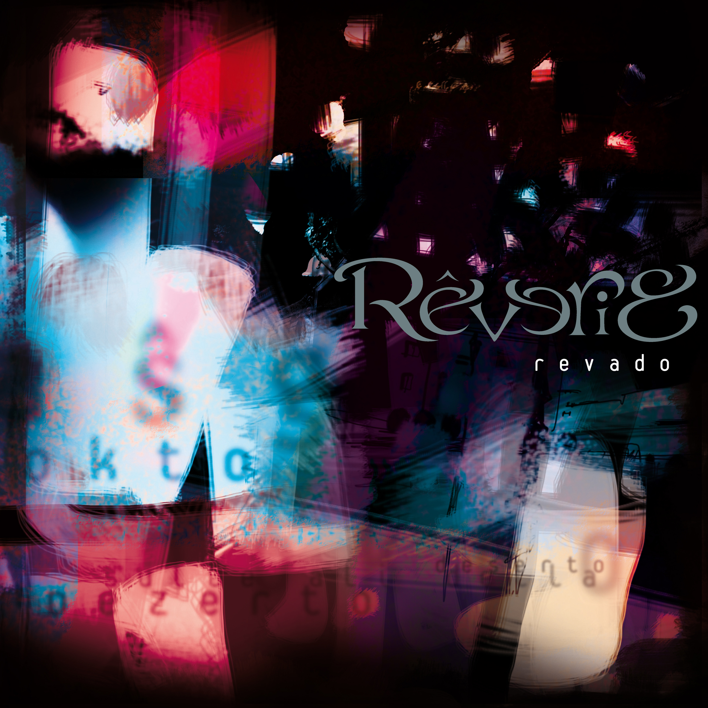 La kovrilo de "Revado", disko de la muzikgrupo Rêverie (2011).